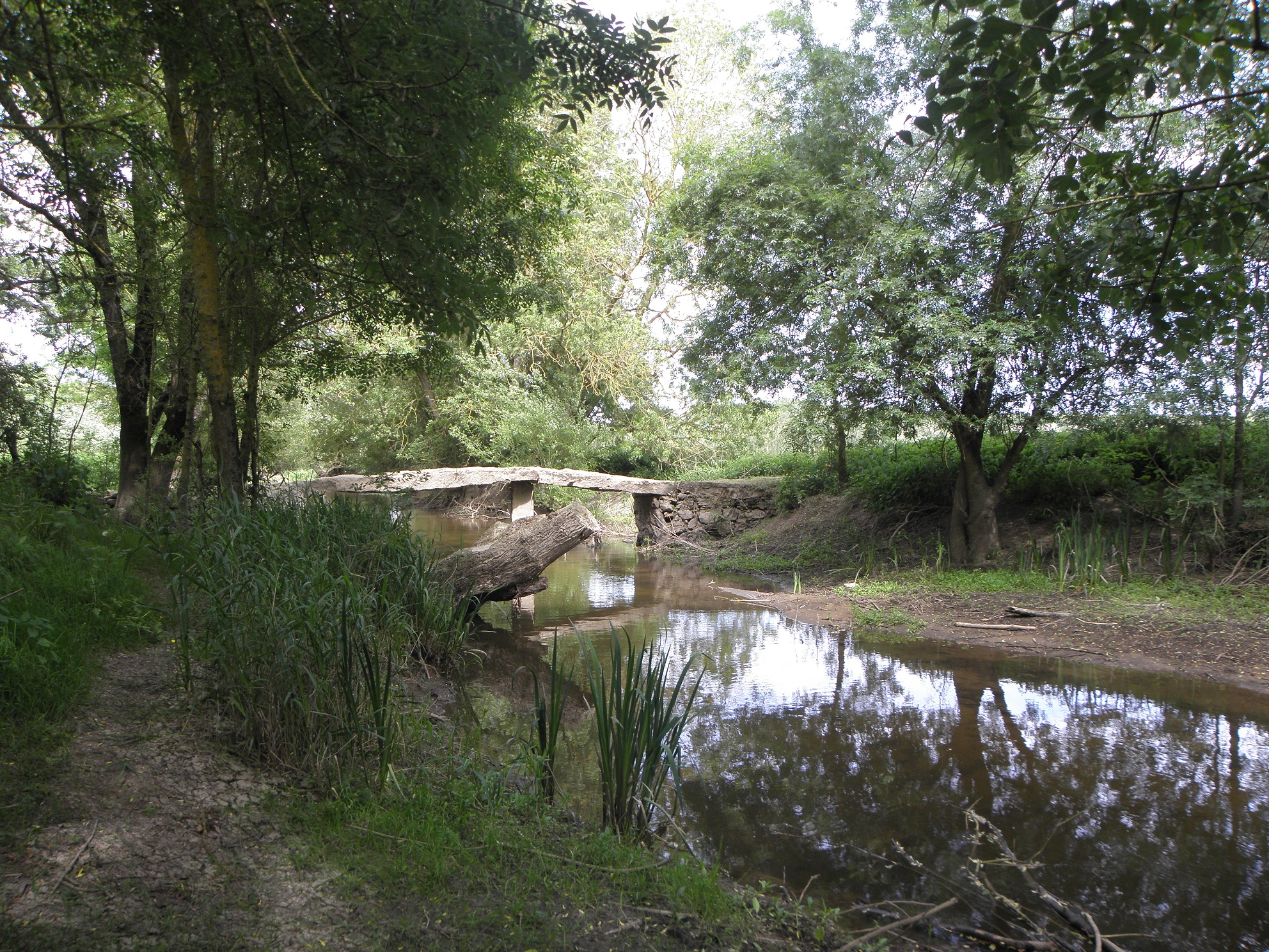 Pont mégalithique d'Artannes-sur-Thouet (49).